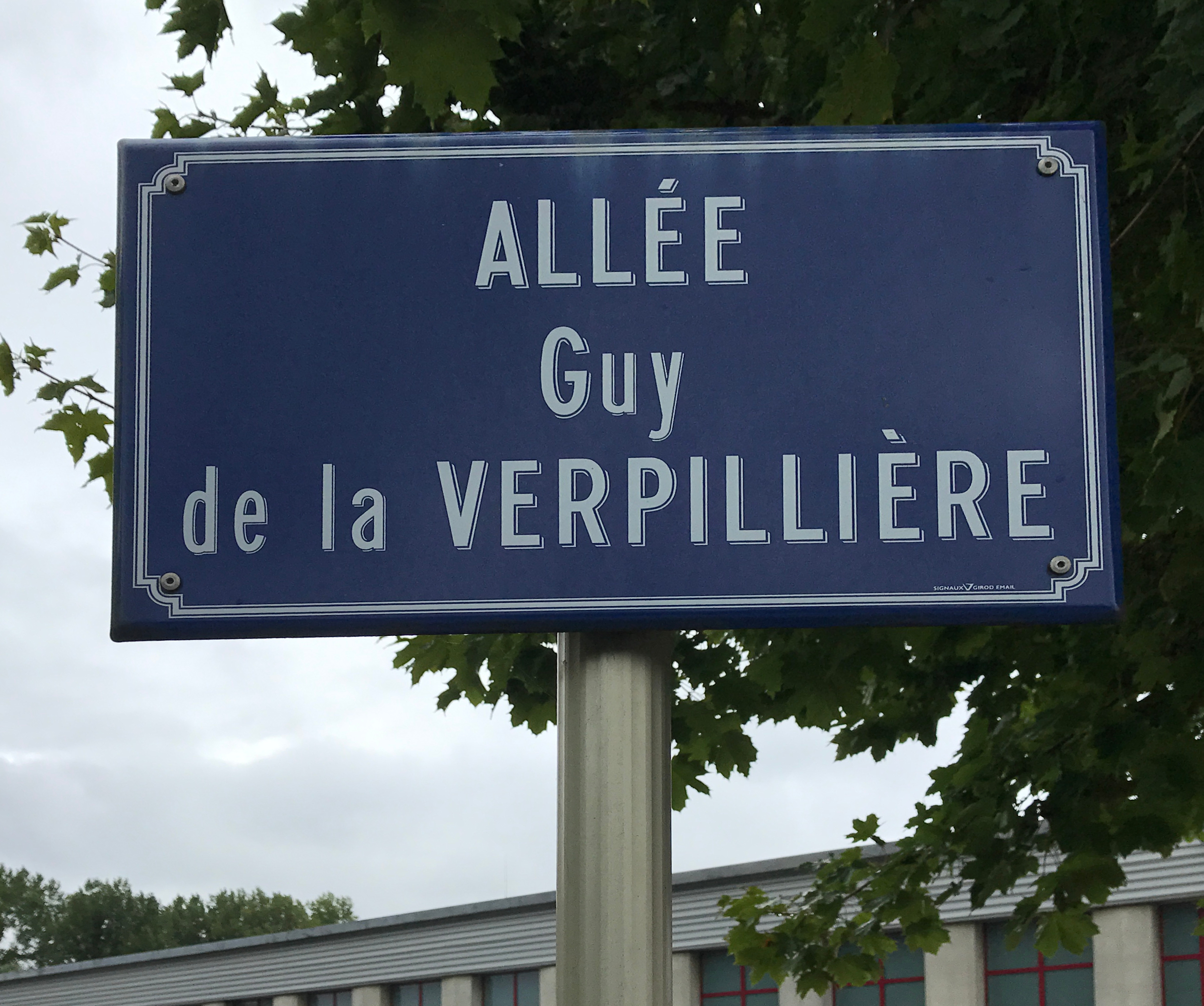 Image de Lagnieu, Ain, France.